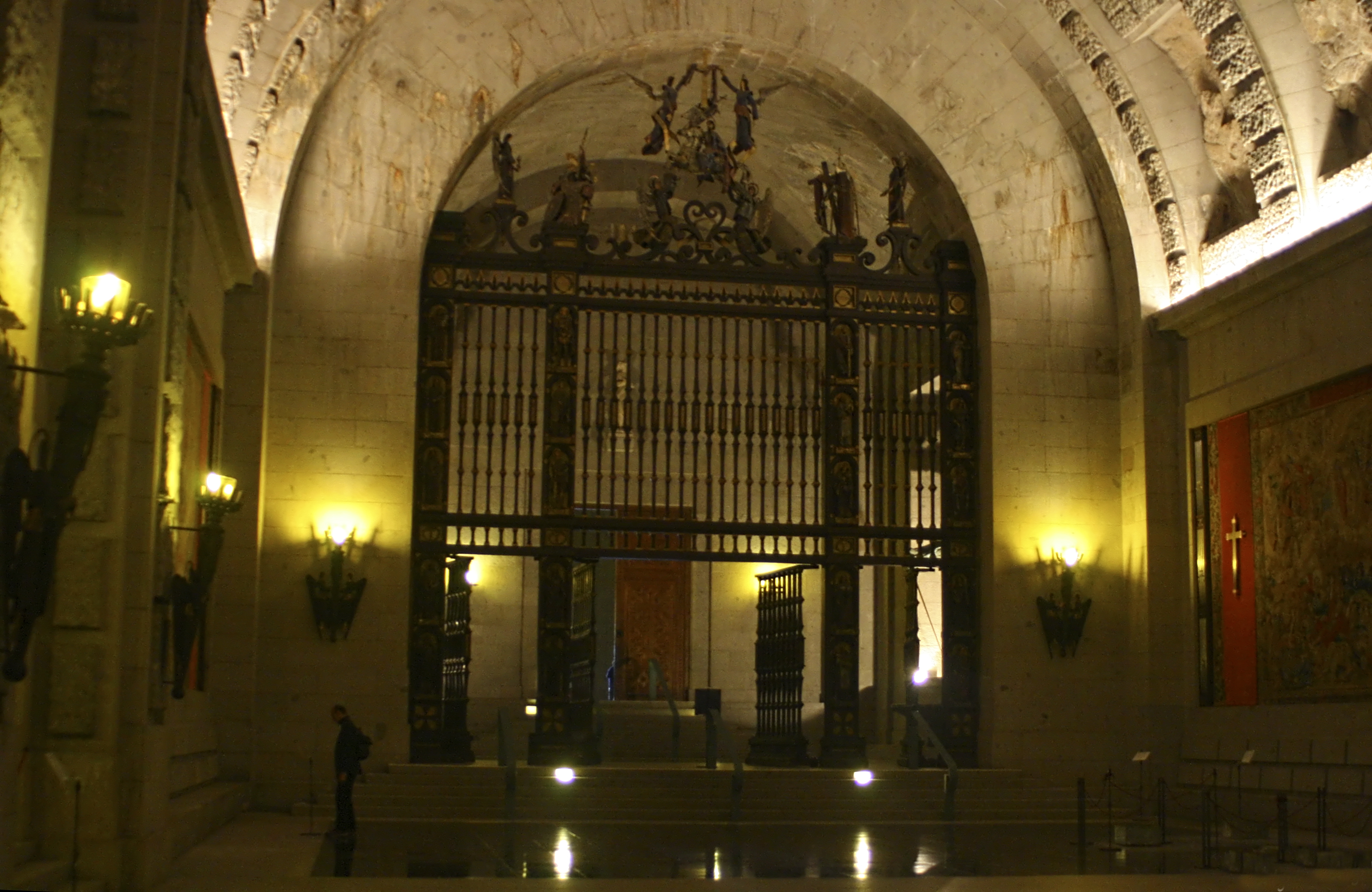 Valle de los Caídos